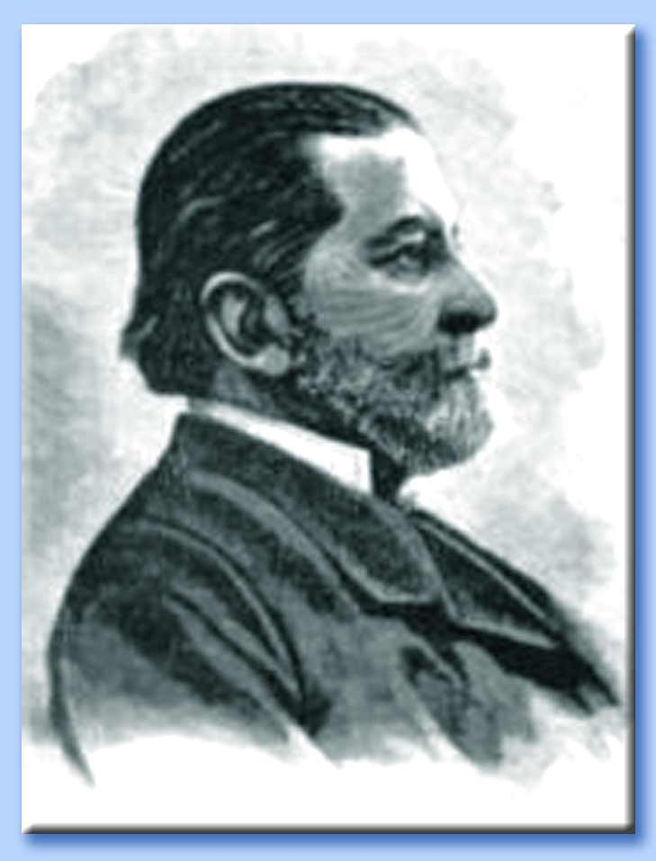 Banchiere italiano